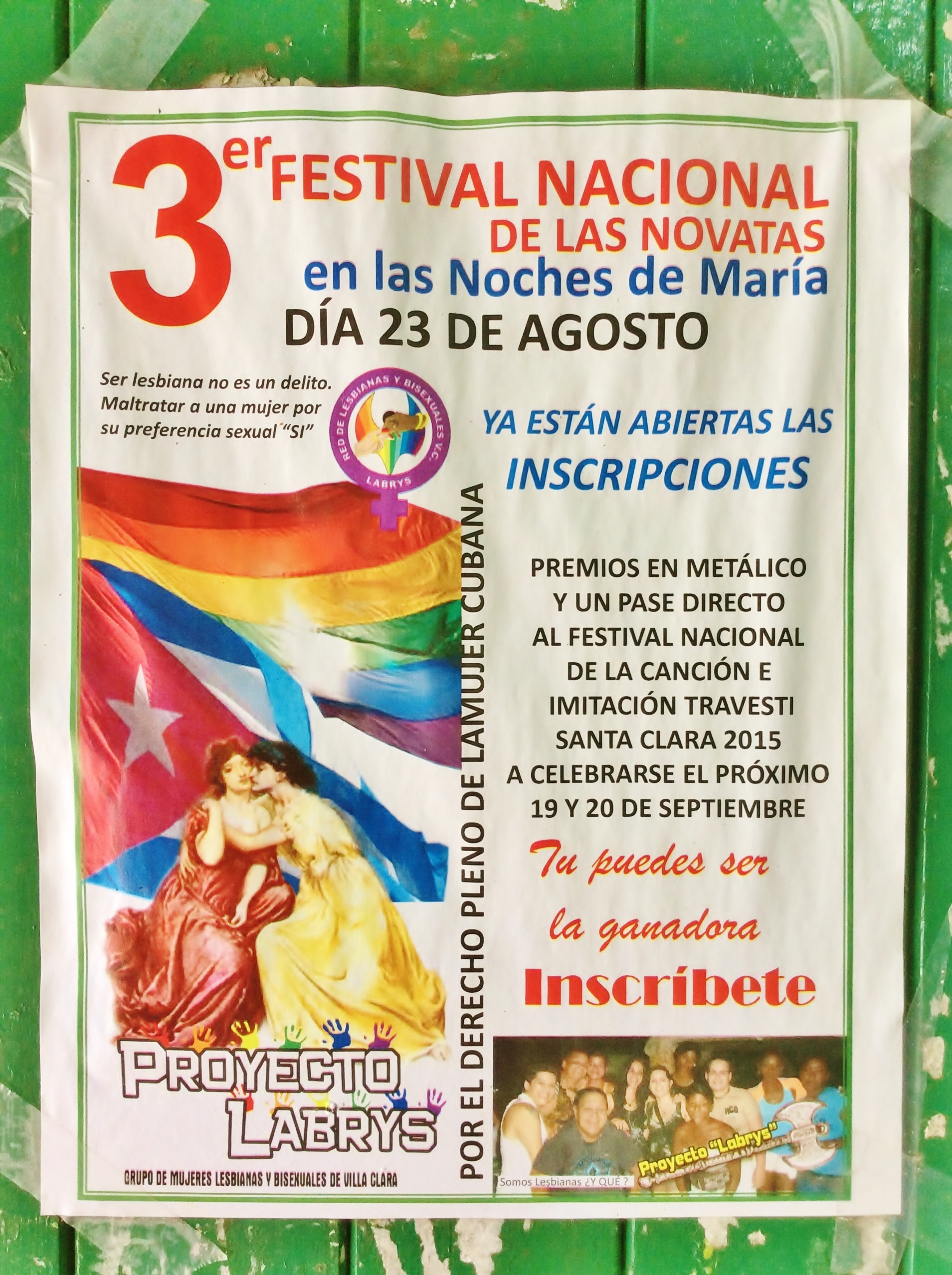 Cartel del 3er festival de travestismo en el Mejunje de Santa Clara